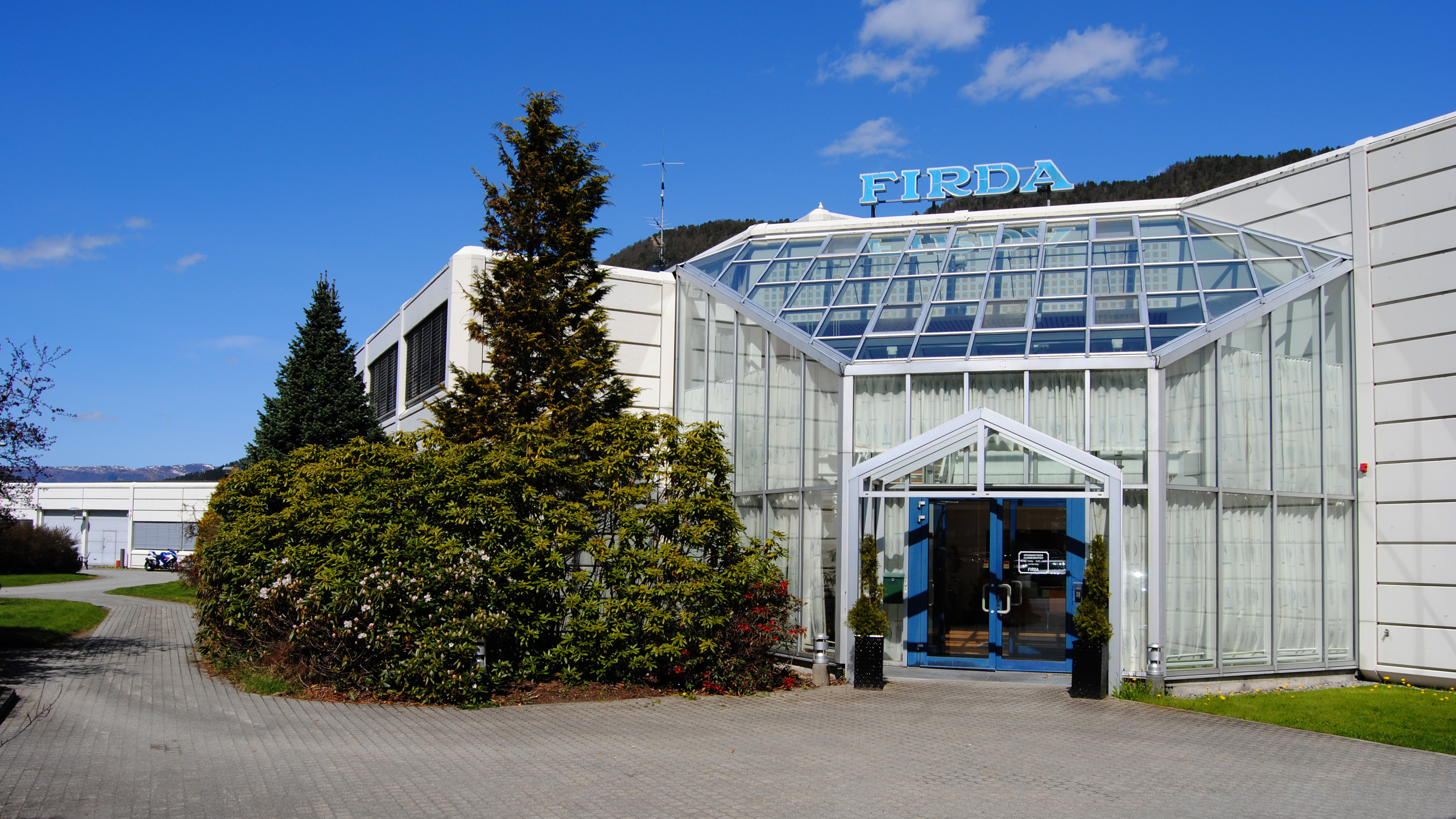 Firda Media - Avishuset Firda i Firdavegen i Førde